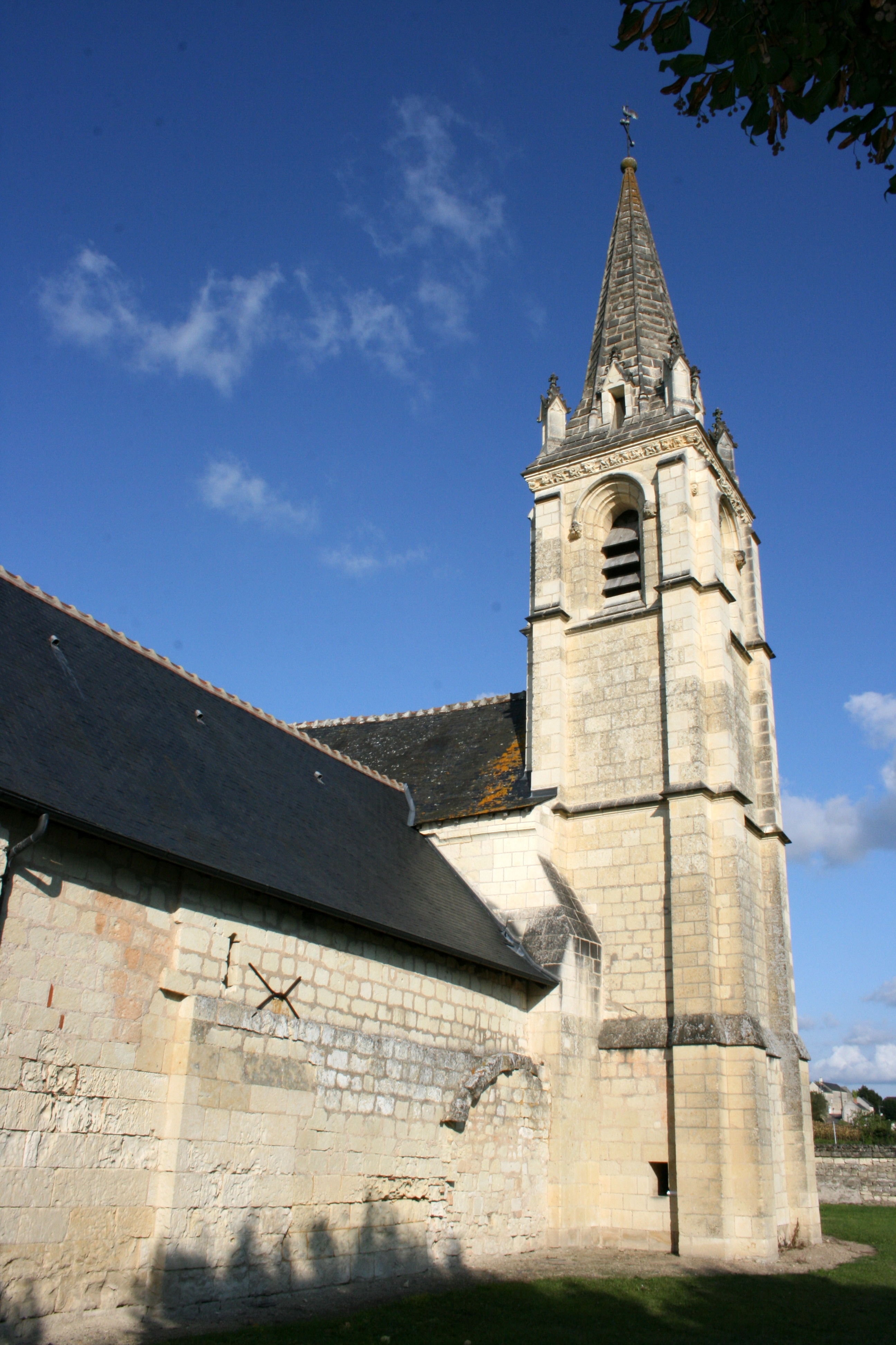 Église paroissiale Saint-Martin de La Roche-Clermault